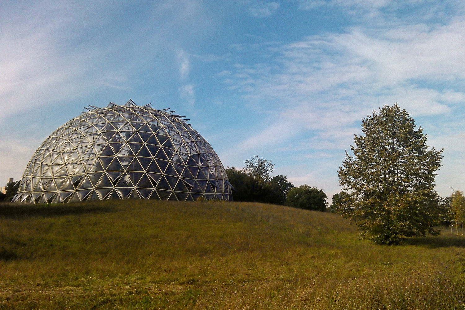 Kuppelgewächshaus aus Osten, Botanischer Garten (Düsseldorf)